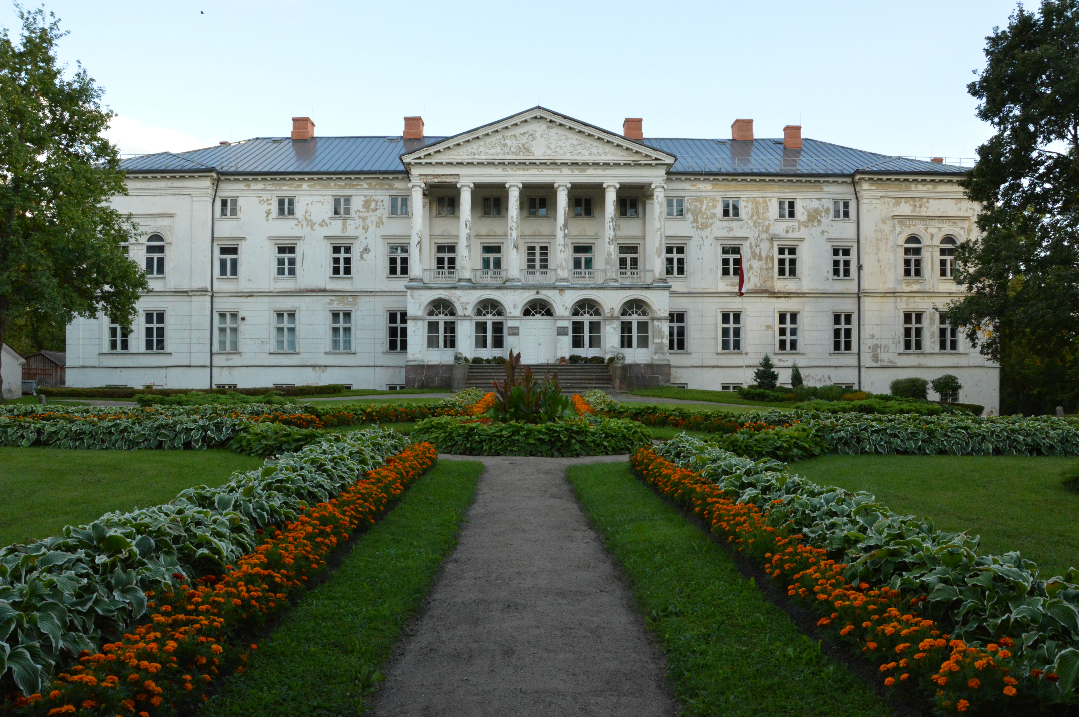 Koivaliina Uus loss